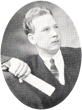 Viking Dahl, svensk tonsättare.